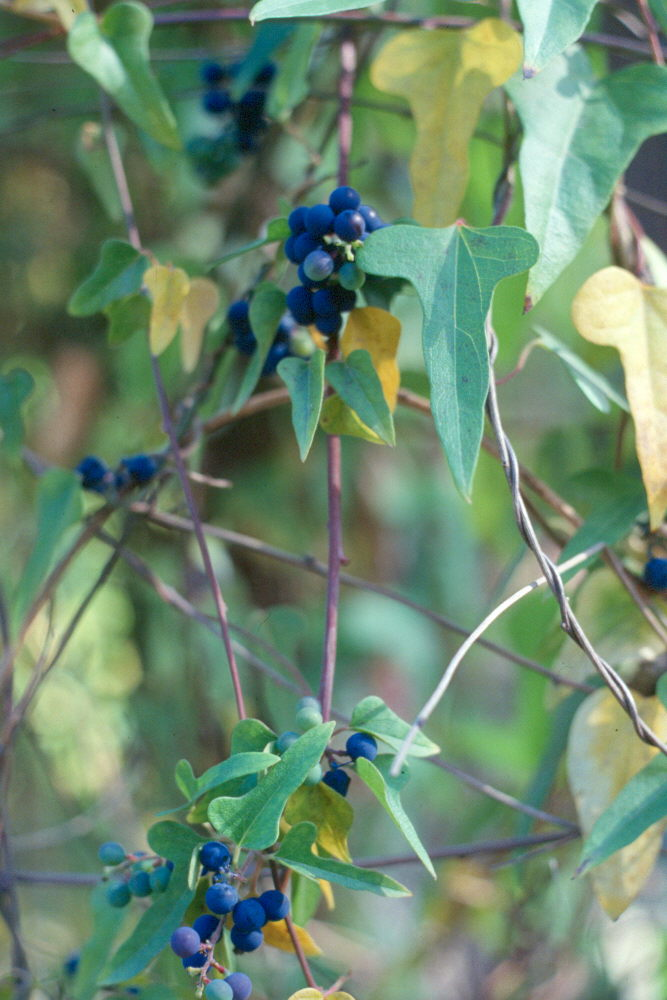 Cocculus orbiculatus (= C. trilobus). Real Jardín Botánico de Madrid.